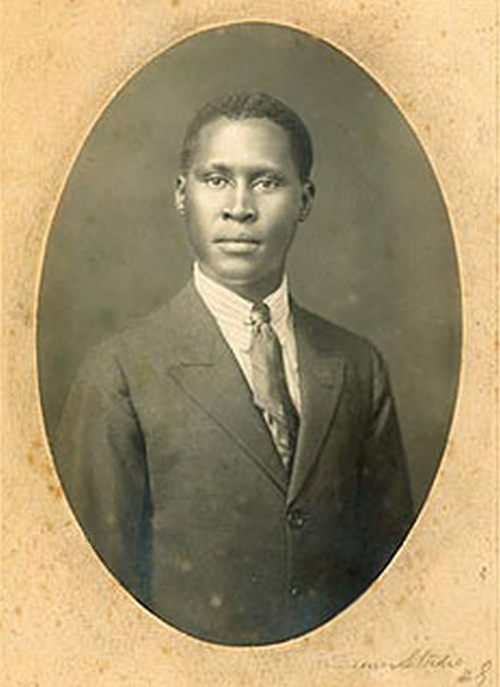 Young Albert Luthuli.